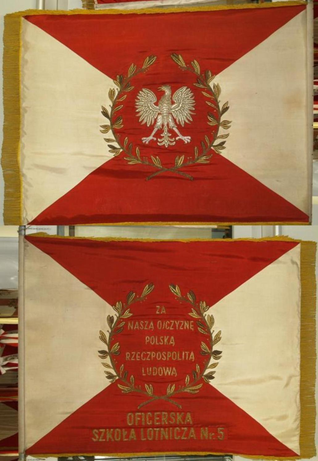 Sztandar OSL Nr 5 z Radomia